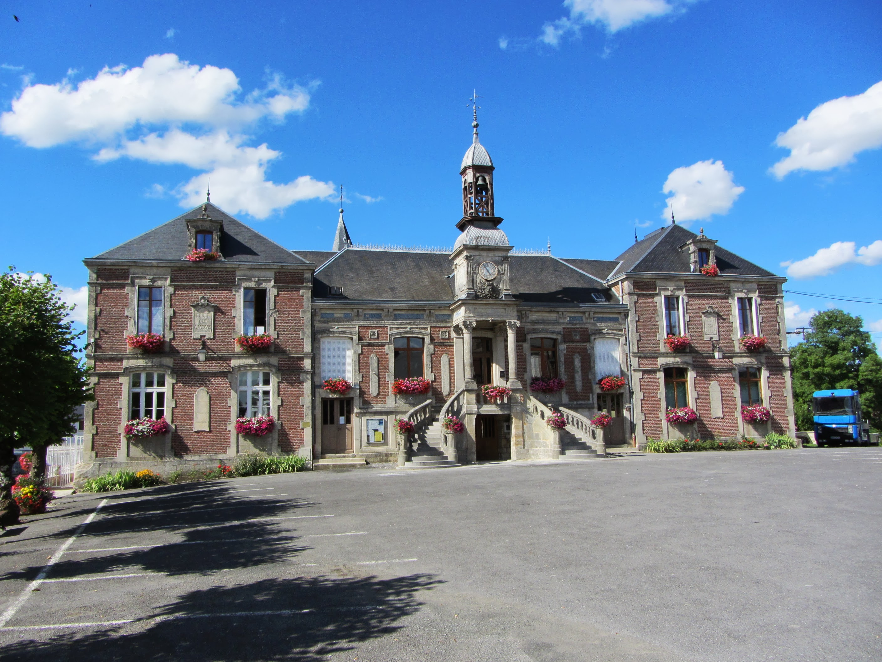 Mairie de Liart